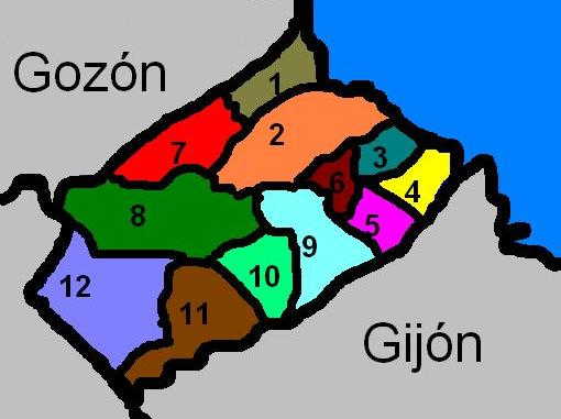 Mapa de las parroquias de Carreño: 1-Candás 2-Perlora3 3-Albandi 4-Carrió 5-Pervera 6-Prendes 7-Piedeloro 8-Logrezana 9-Guimarán 10-El Valle 11-Ambás 12-Tamón